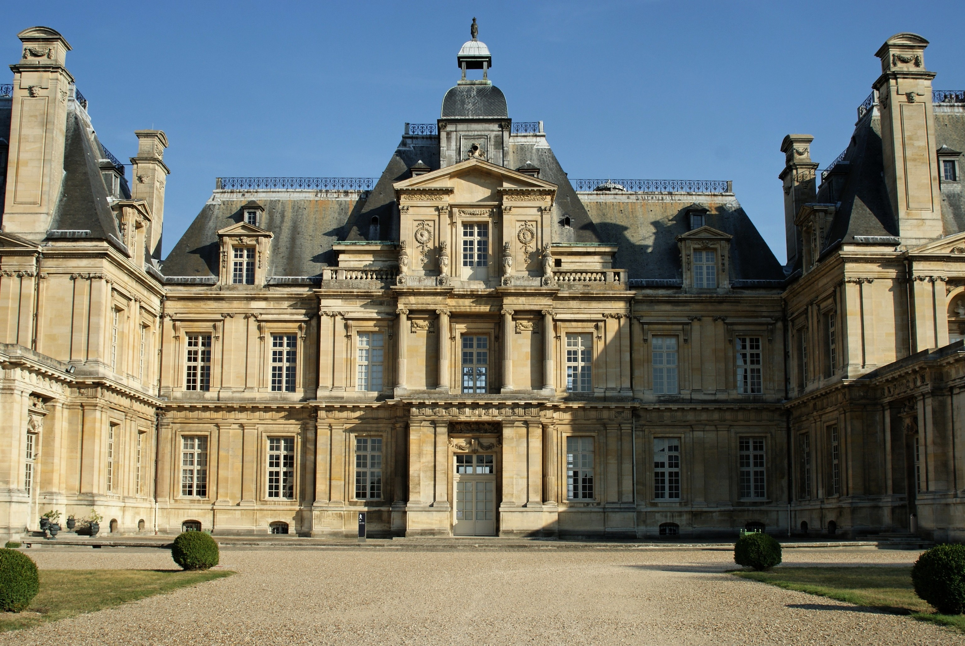 Le Château de Maisons Laffitte.